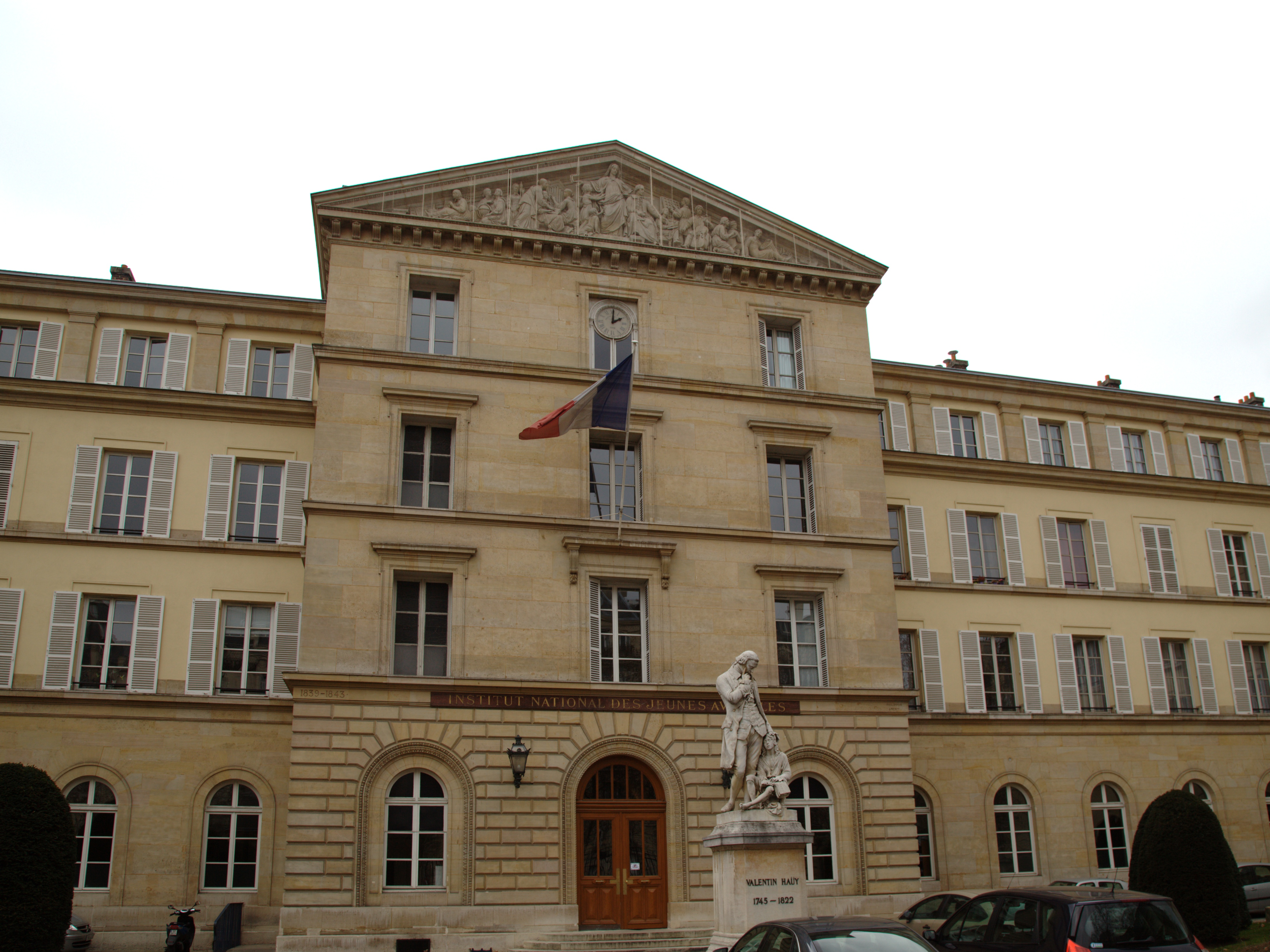 L'institut national des jeunes aveugles à Paris, façade vers le boulevard des Invalides